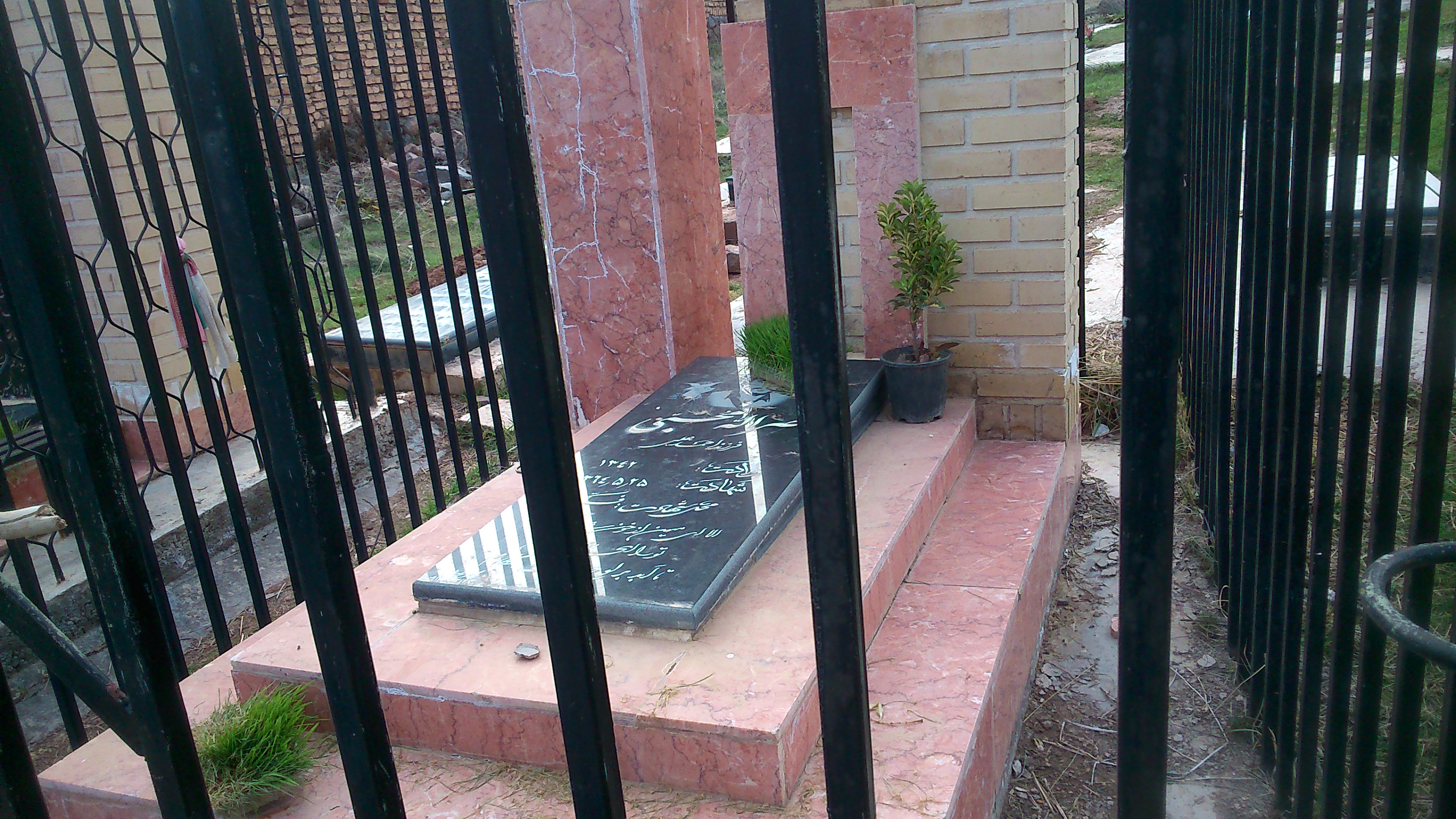 آرامگاه نصرالله محبی آرموت